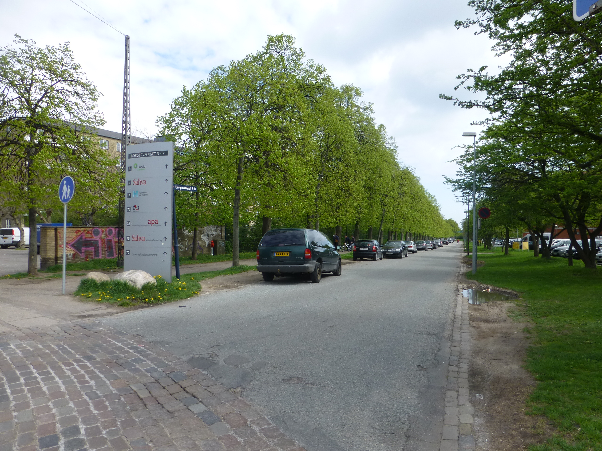 The street Borgervænget in Østerbro in Copenhagen.